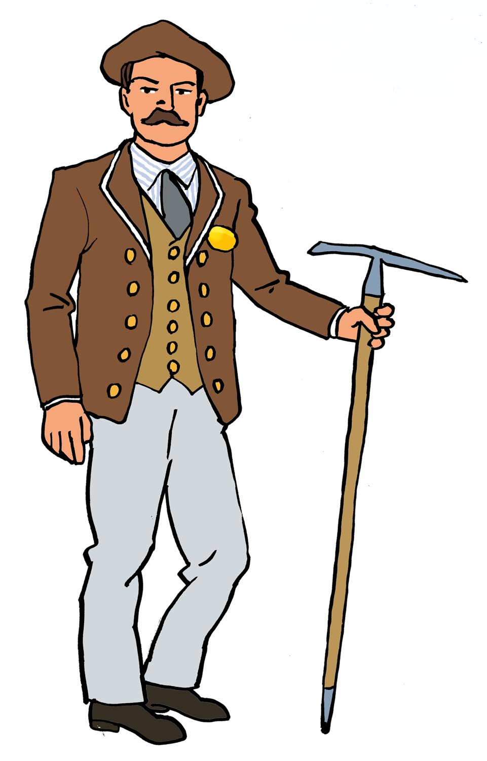 Guide de Gavarnie